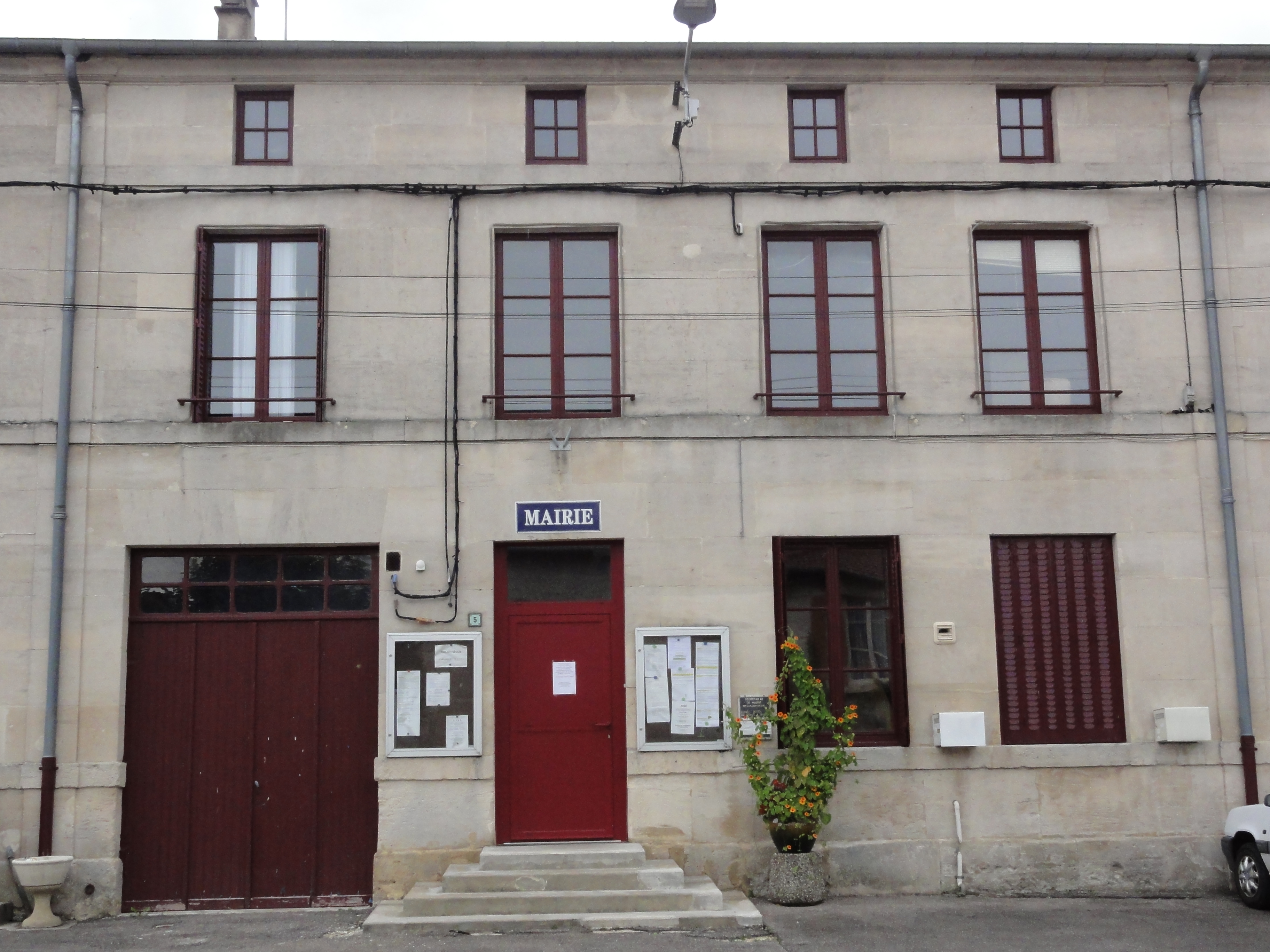 Rupt-aux-Nonains (Meuse) mairie